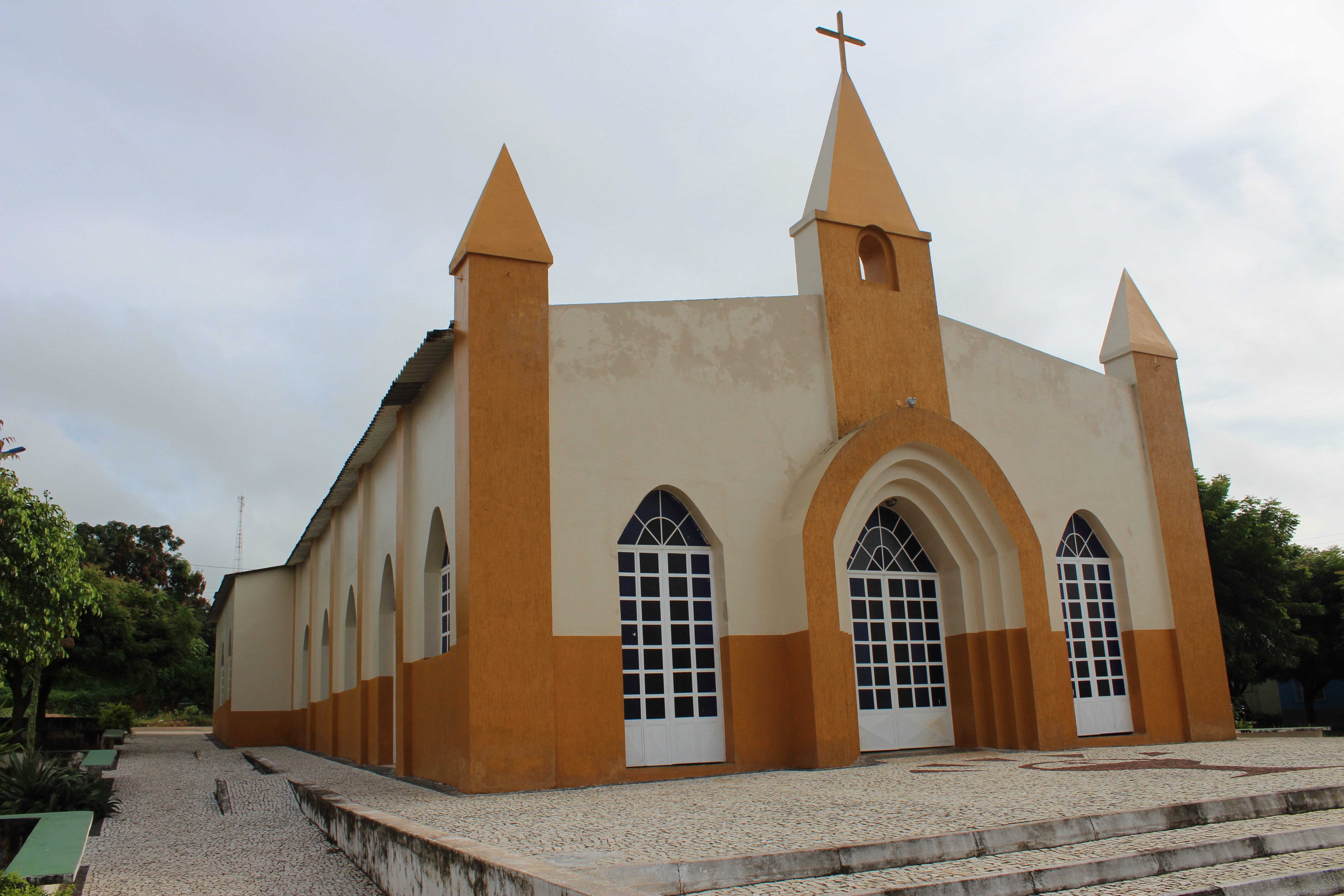 Igreja central do distrito de Arapá, em Tianguá, Ceará.